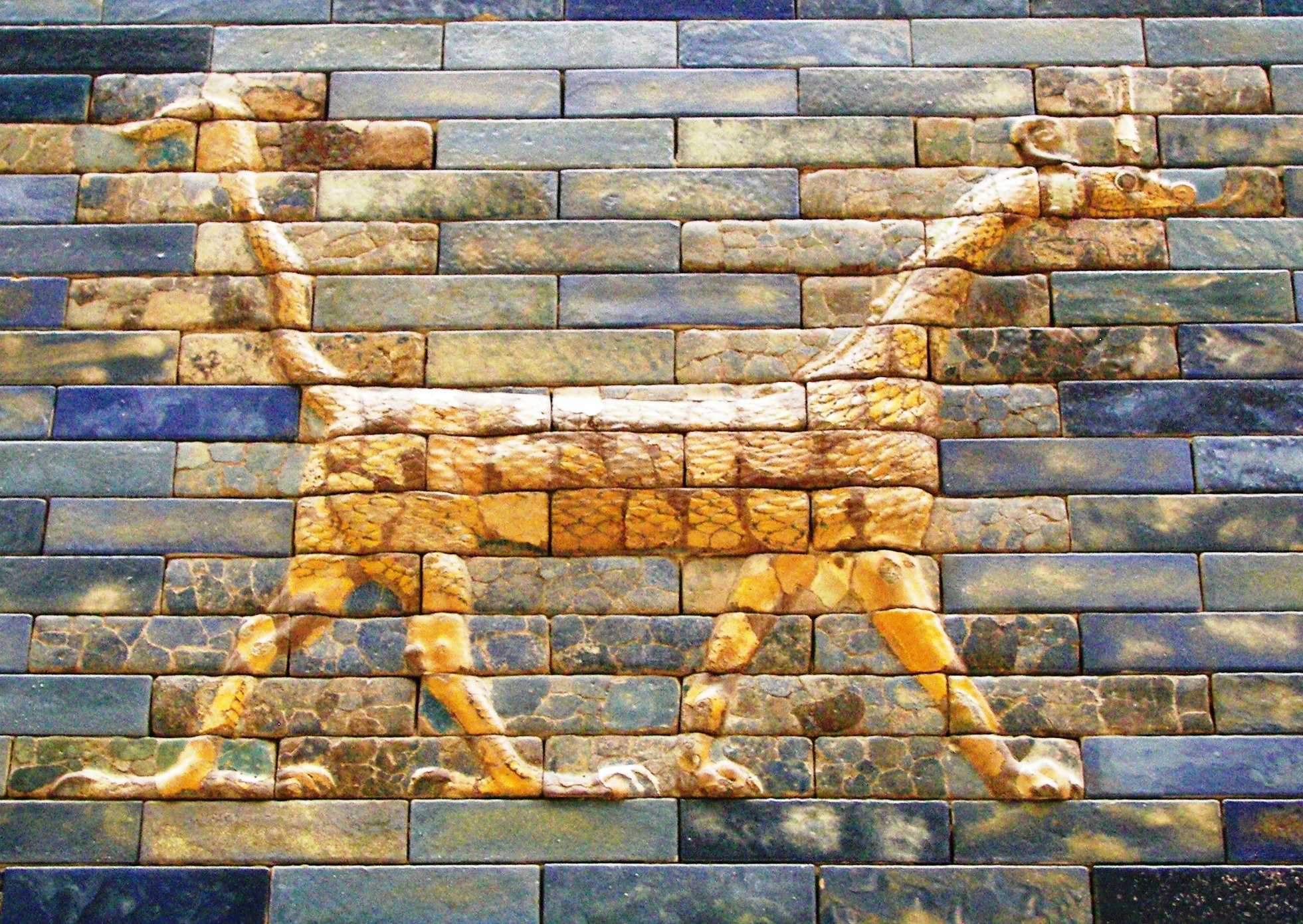 Mushkhushu, Porte d'Ishtar, Babylone ; , adapté à partir de Ishtartor 02.jpg